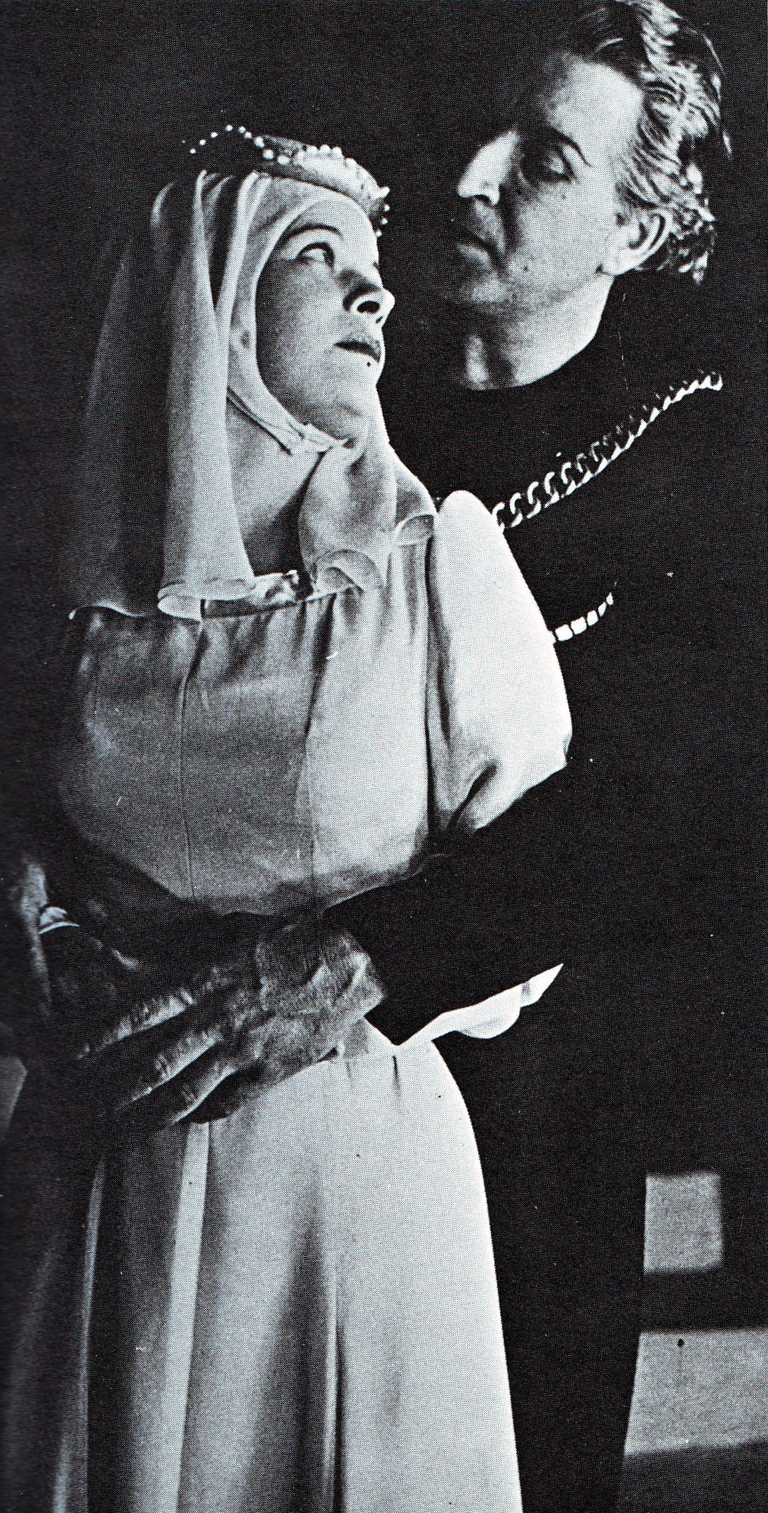 André Huguenet as Hamlet en Berdine Grunewald as Ophelia in Hamlet, wat Huguenet in 1947 ter viering van sy 21ste jubileum in Johannesburg en Pretoria opgevoer het.